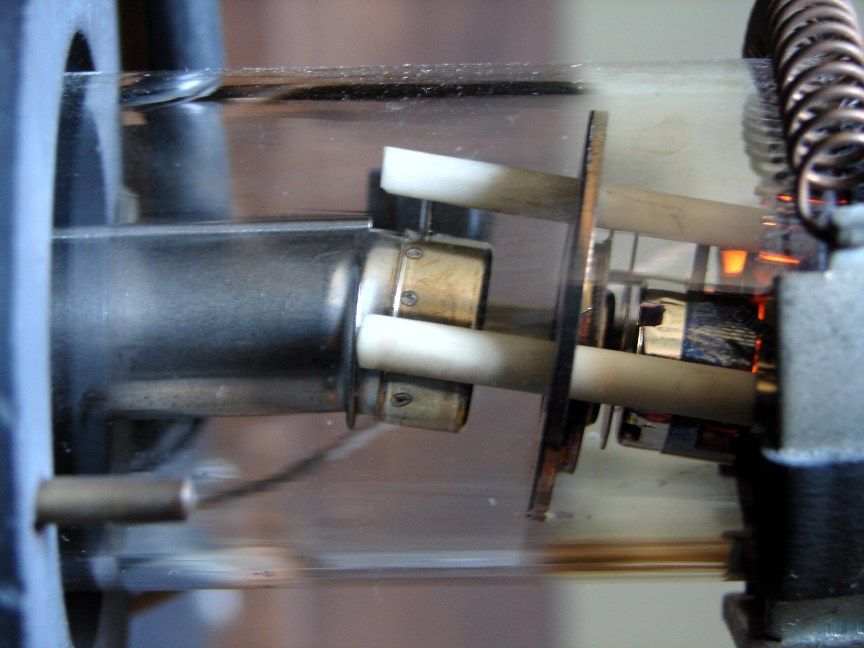 Ansicht eines Bildröhrenhalses mit beiseitegeschobenem Ionenfallenmagneten.